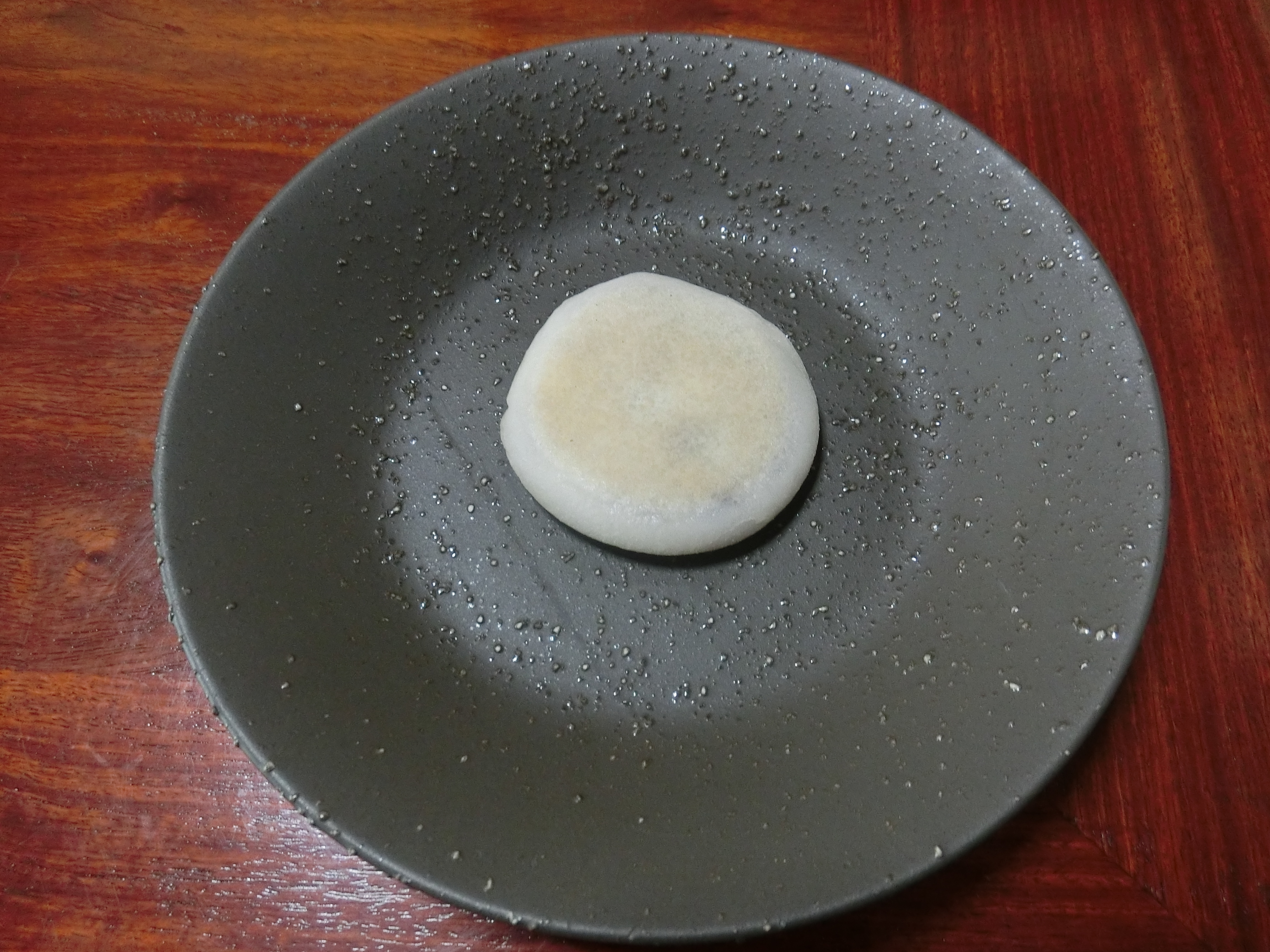 三重県伊勢市の和菓子